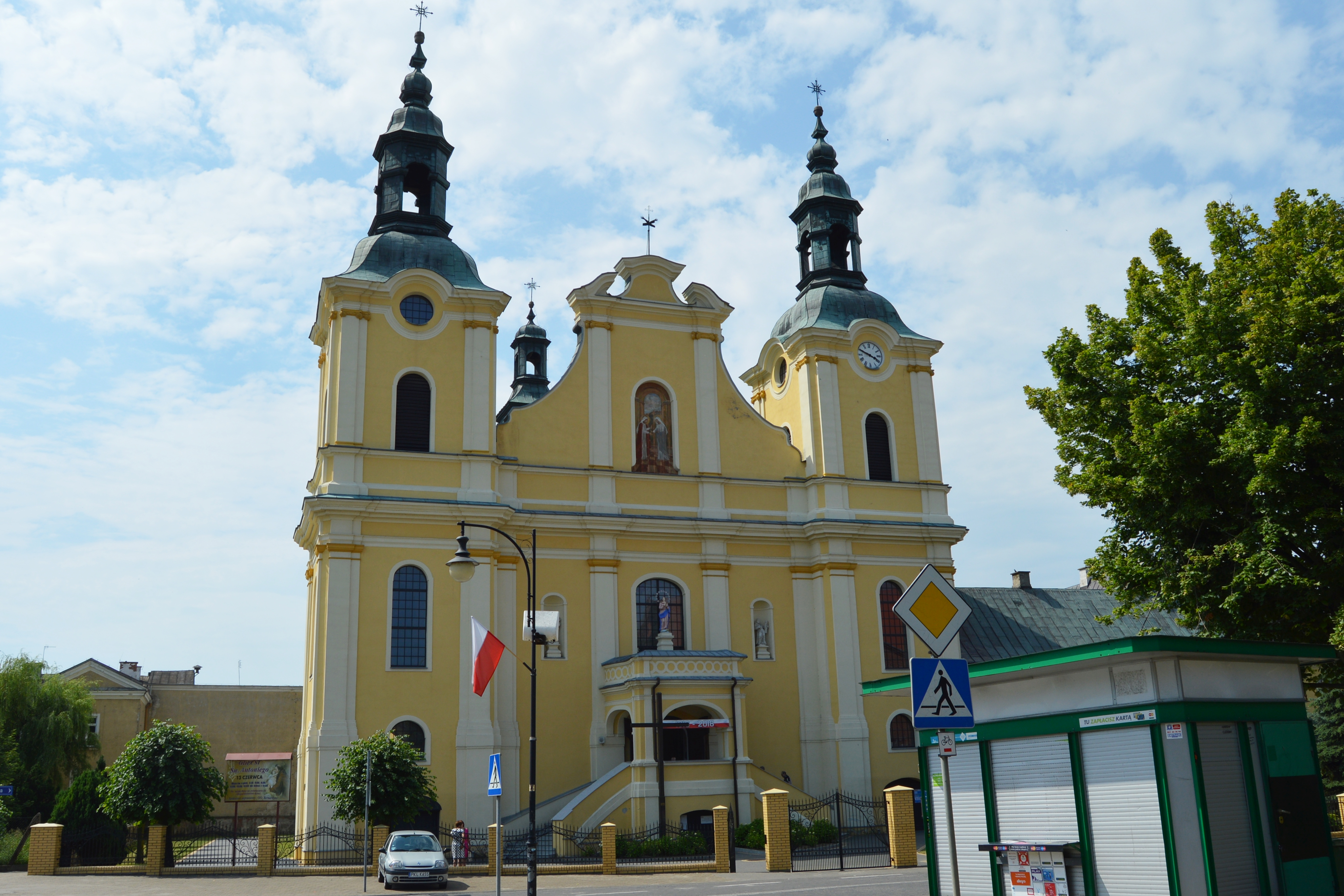 fasada kościoła Nawiedzenia Najświętszej Maryi Panny w Kole, ojcowie bernardyni